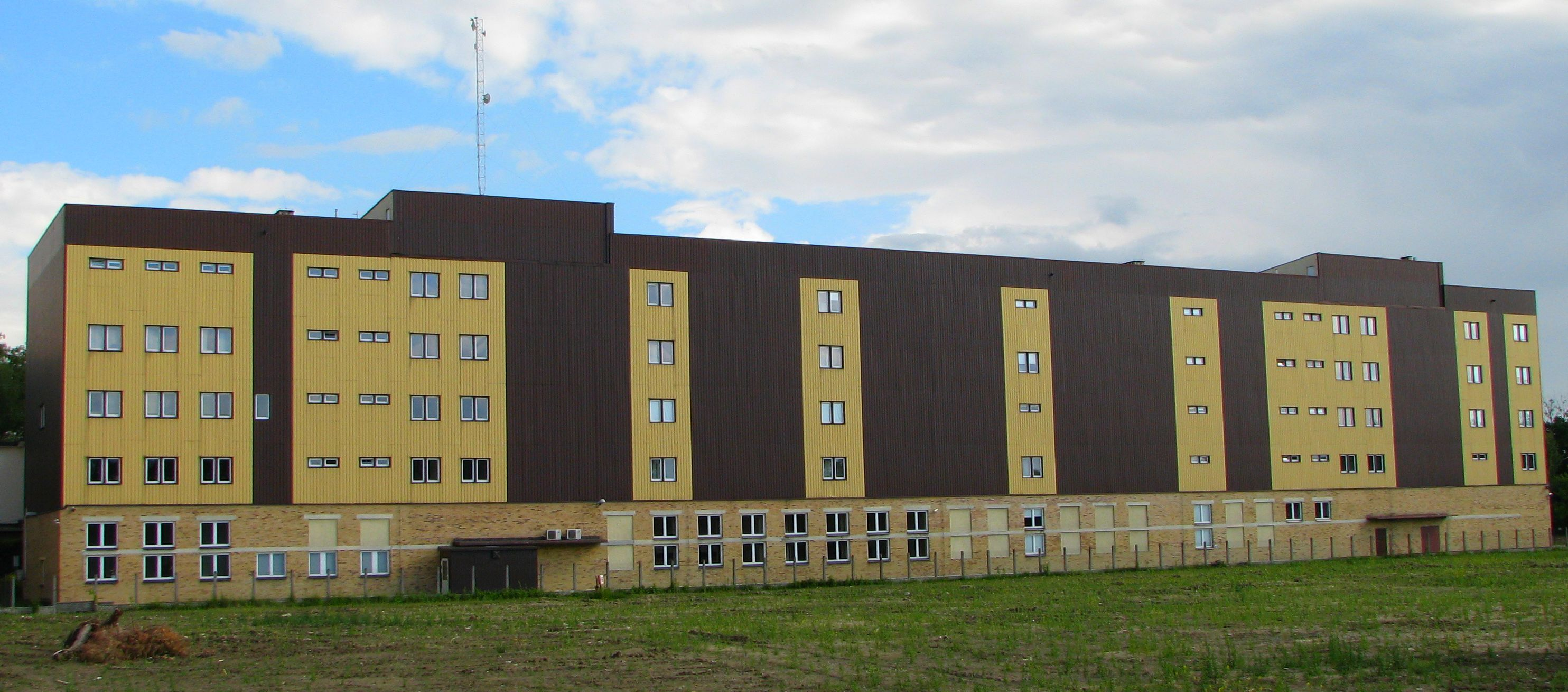 Archiwum Dokumentacji Osobowej i Płacowej w Milanówku